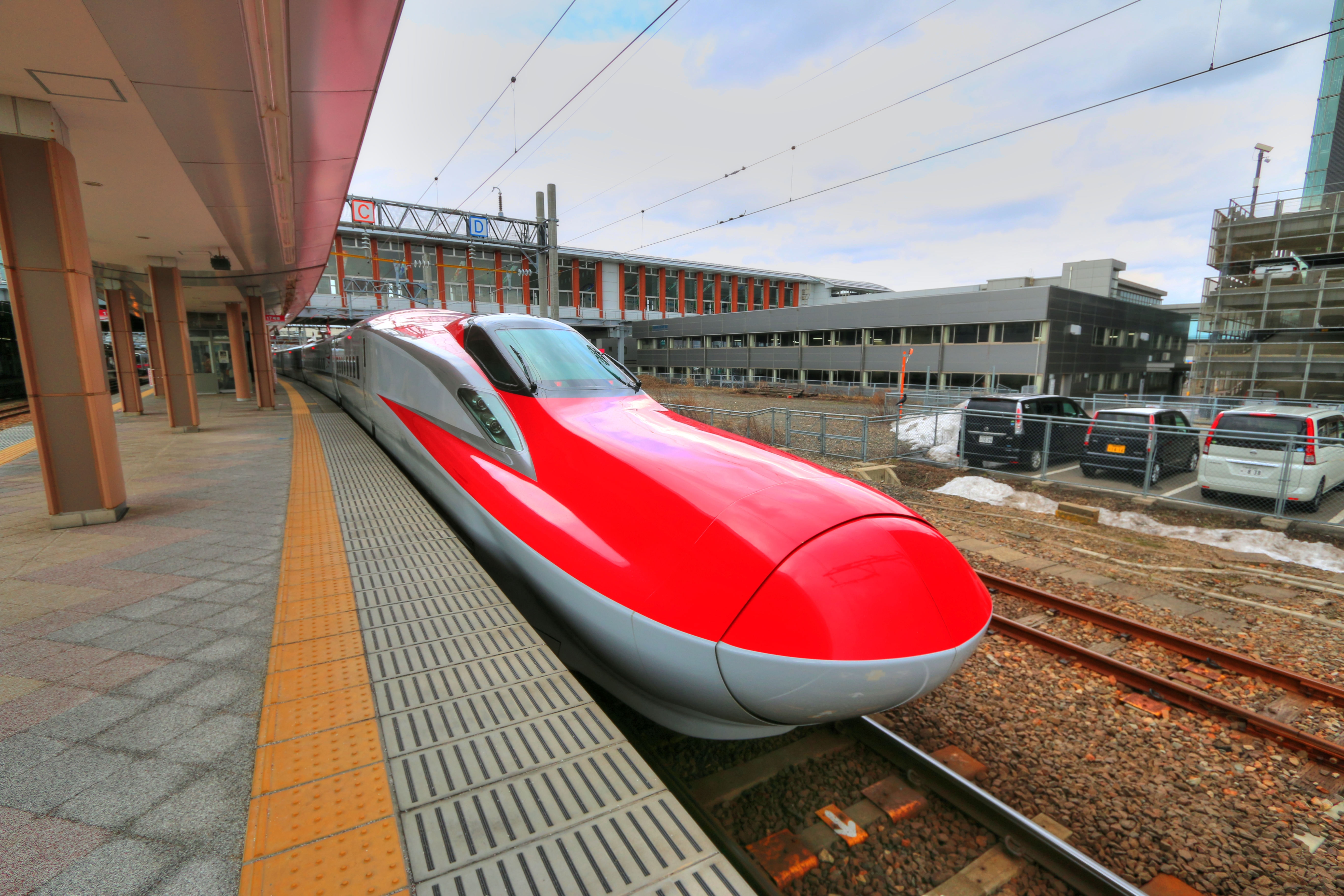 秋田駅